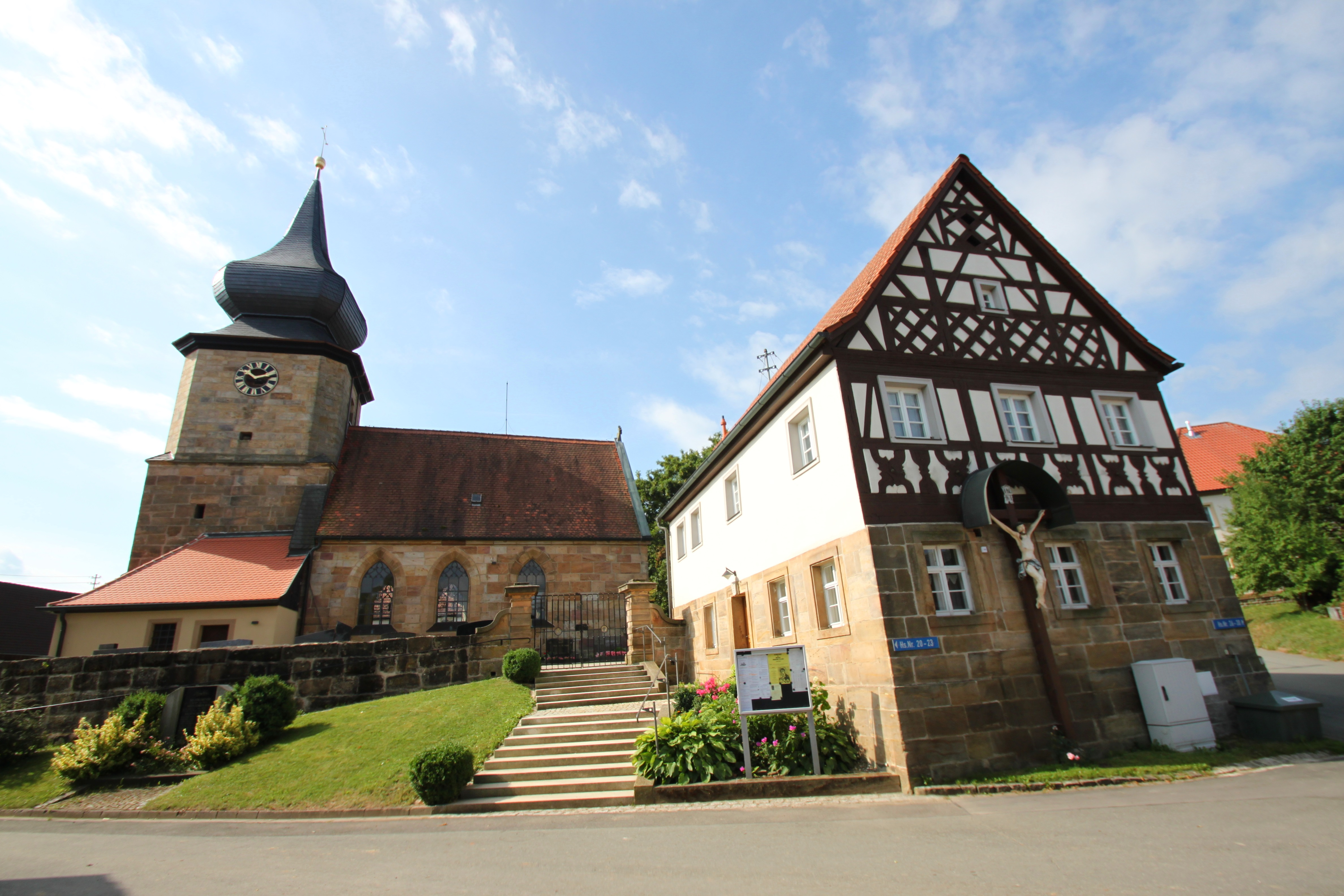 katholische Pfarrkirche St. Maternus in Motschenbach, Baudenkmal D-4-77-136-33